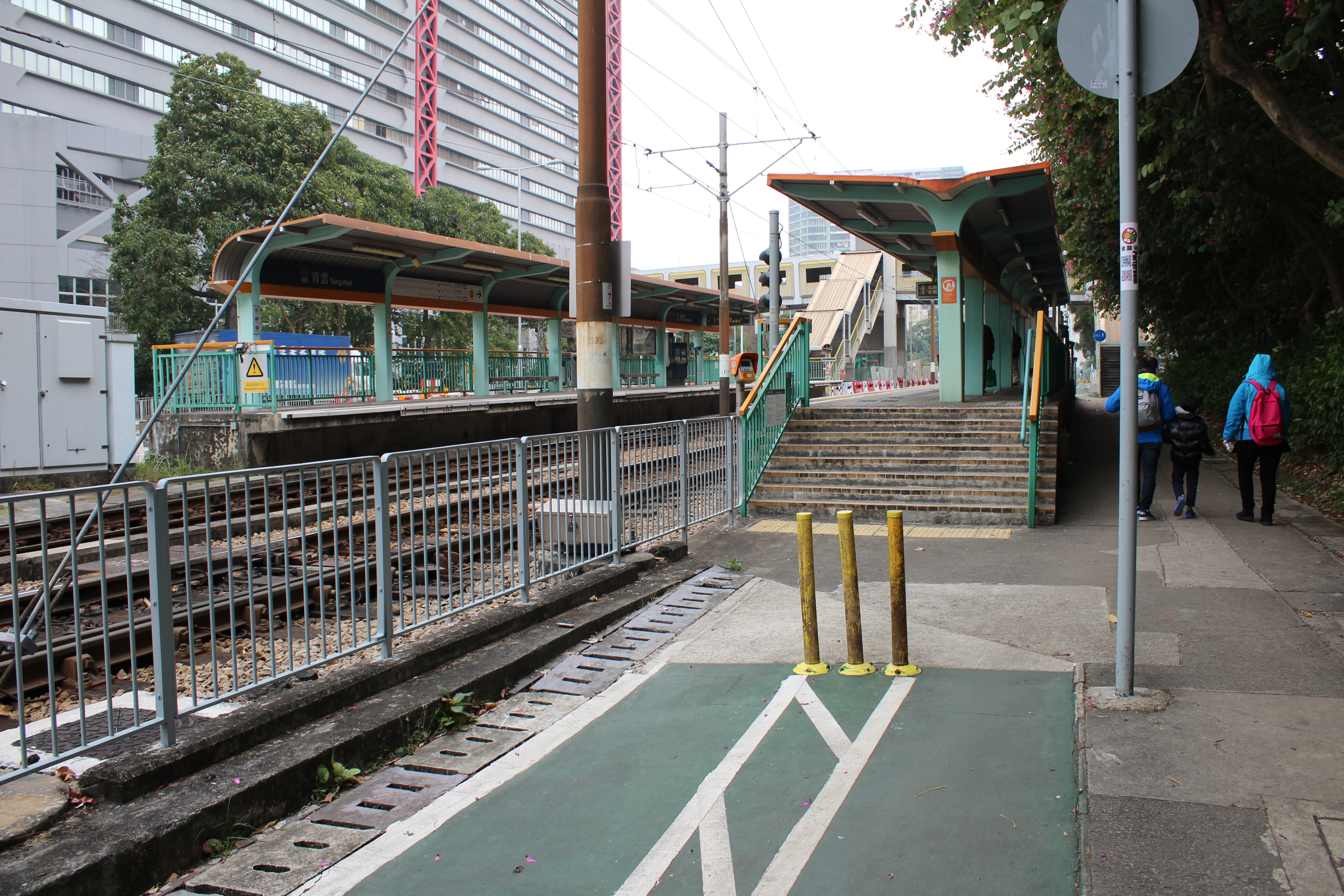 青雲站月台